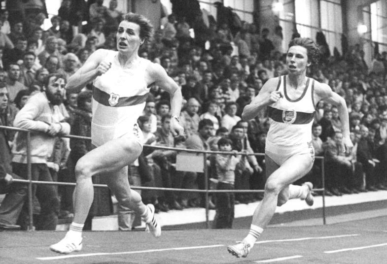 Marita Koch, Kirsten Emmelmann ADN-ZB Kluge 16.2.86 Bez. Cottbus: DDR-Hallenmeisterschaften in der Leichtathletik- Marita Koch (SC Empor Rostock- r.) verbesserte über 200 m in Senftenberg ihre eigene Weltbestmarke um sechs Hundertstelsekunden auf 22,33 s. Die alte Bestzeit hatte sie vor drei Jahren in Budapest aufgestellt. Links Kirsten Emmelmann (SC Magdeburg), die Zweite wurde.